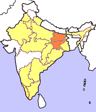 Kartorna bygger på resultat i senaste delstatsval (Juni 2004). Rött betyder att partiet deltar i delstatsregeringen, orange att partiet vann mandat i senaste delstatsvalet och gult att partiet hade lanserat kandidater men utan att vinna mandat. Kartorna tar inte hänsyn till avhopp, partifusioner och fyllnadsval under den ordinarie mandatperiodens gång.